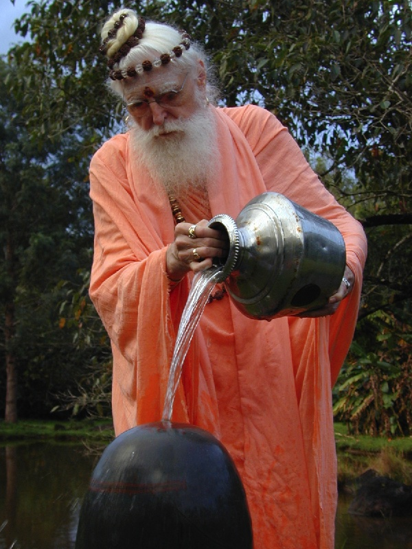 Satguru Sivaya Subramuniyaswami (Gurudeva) worshipping in his monastery.